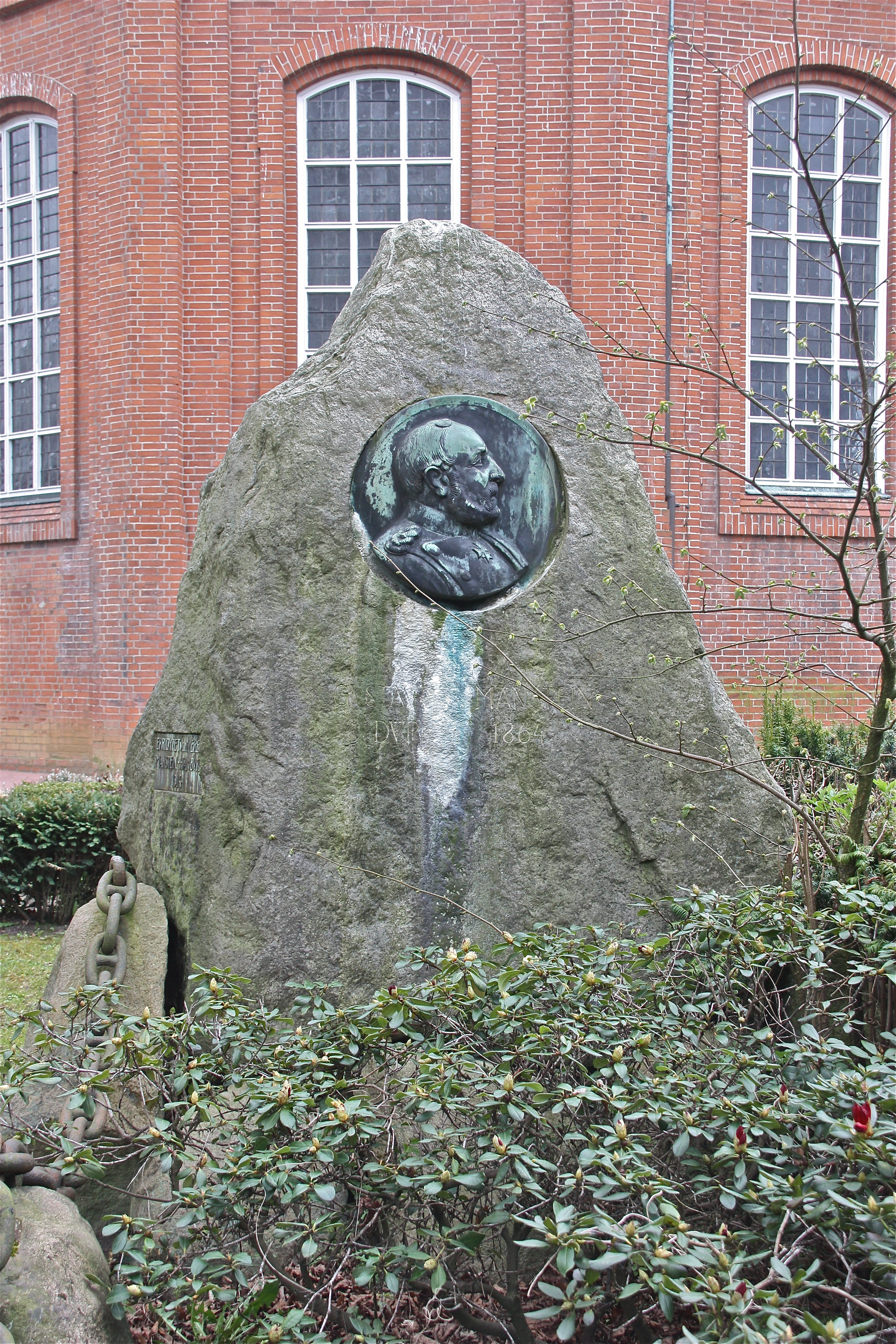 Hamburg, Billwerder, St. NIkolai-Kirche, Friedhof, Grab Gustav v.Manstein